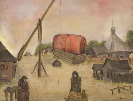 Беларуская (тарашкевіца): Дабрамысьлі (Dabramyśli). Драўляная царква